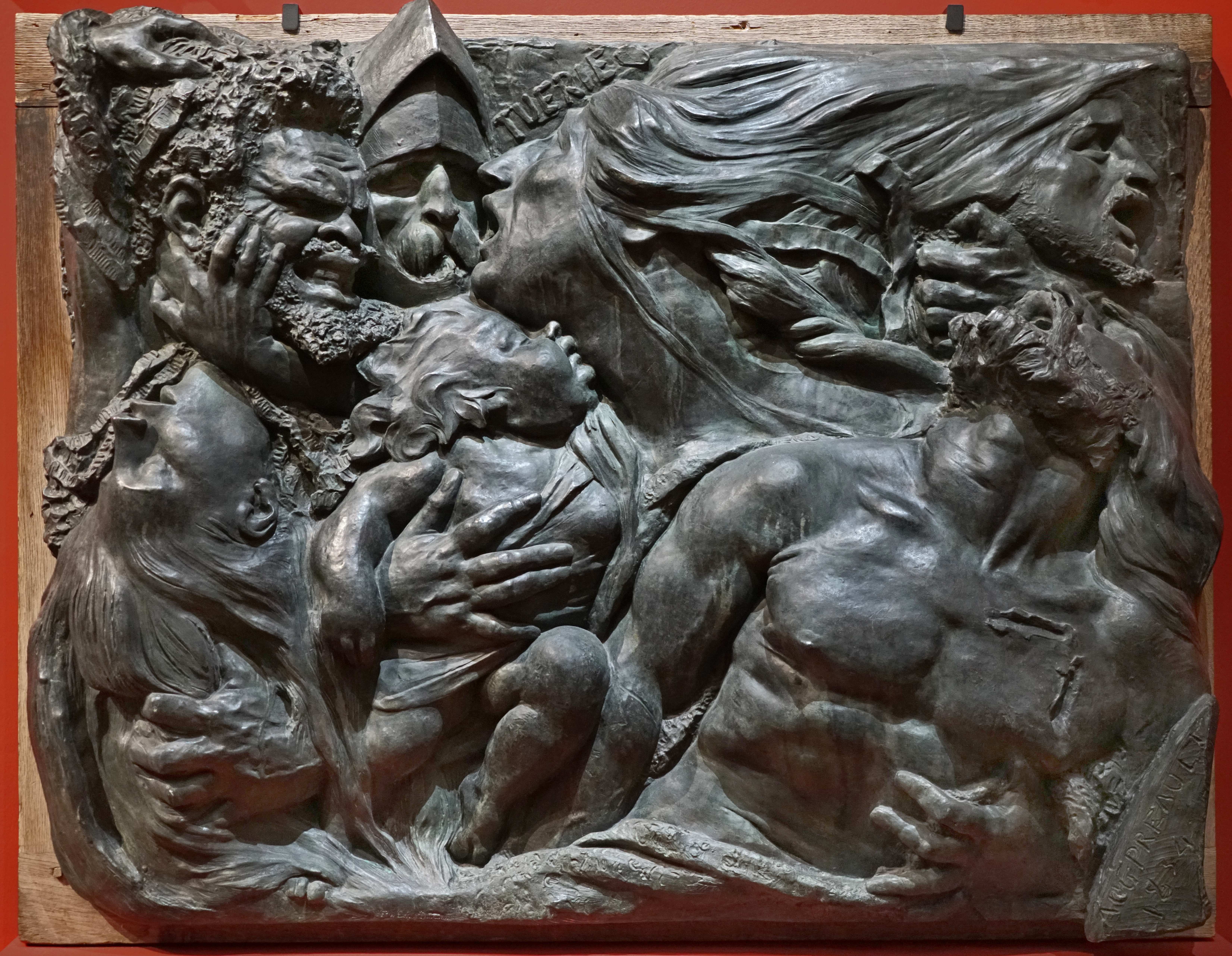 Tuerie, fragment épisodique d'un grand bas-relief Œuvre d'Auguste Préault (1809-1879) 1834 Bronze, fonte réalisée en 1850 Salon de 1834, plâtre, n°2124 Salon de 1850, bronze, n°3566 Chartres, musée des Beaux-arts (inv. 2009.108.1) L’œuvre a été très mal perçue à son époque mais elle est devenue emblématique de l'école romantique Œuvre présentée dans l'exposition "Paris romantique, 1815-1848" au Petit Palais, à Paris. Site de l'exposition "Paris romantique, 1815-1848" au Petit Palais. Musée des Beaux-Arts de la ville de Paris